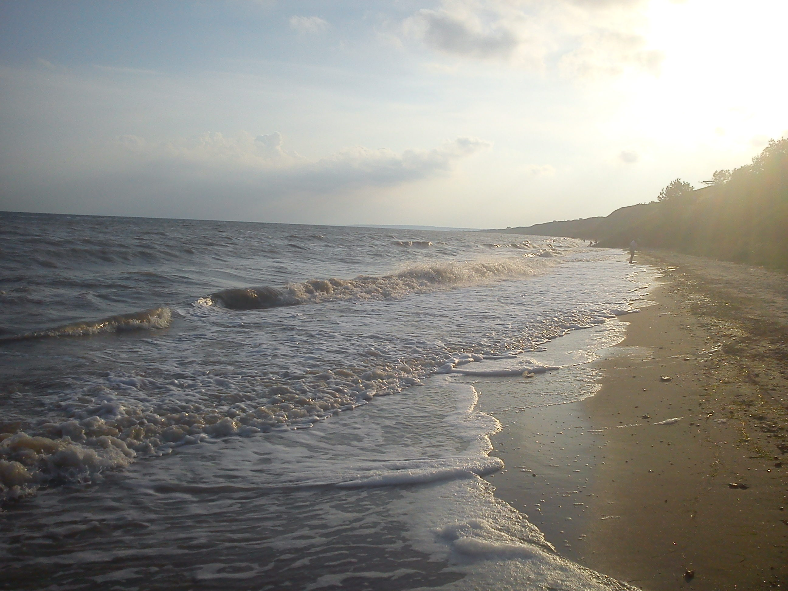 город Бердянск пляж района АКЗ